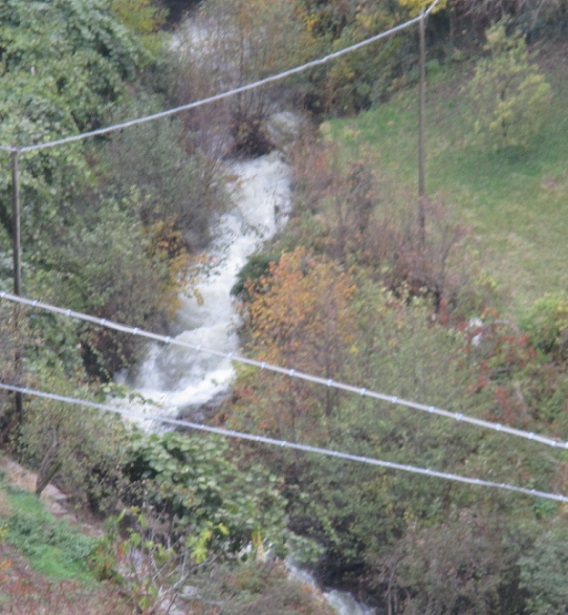 Il torrente Silla presso San Mauro (Baselga di Piné)